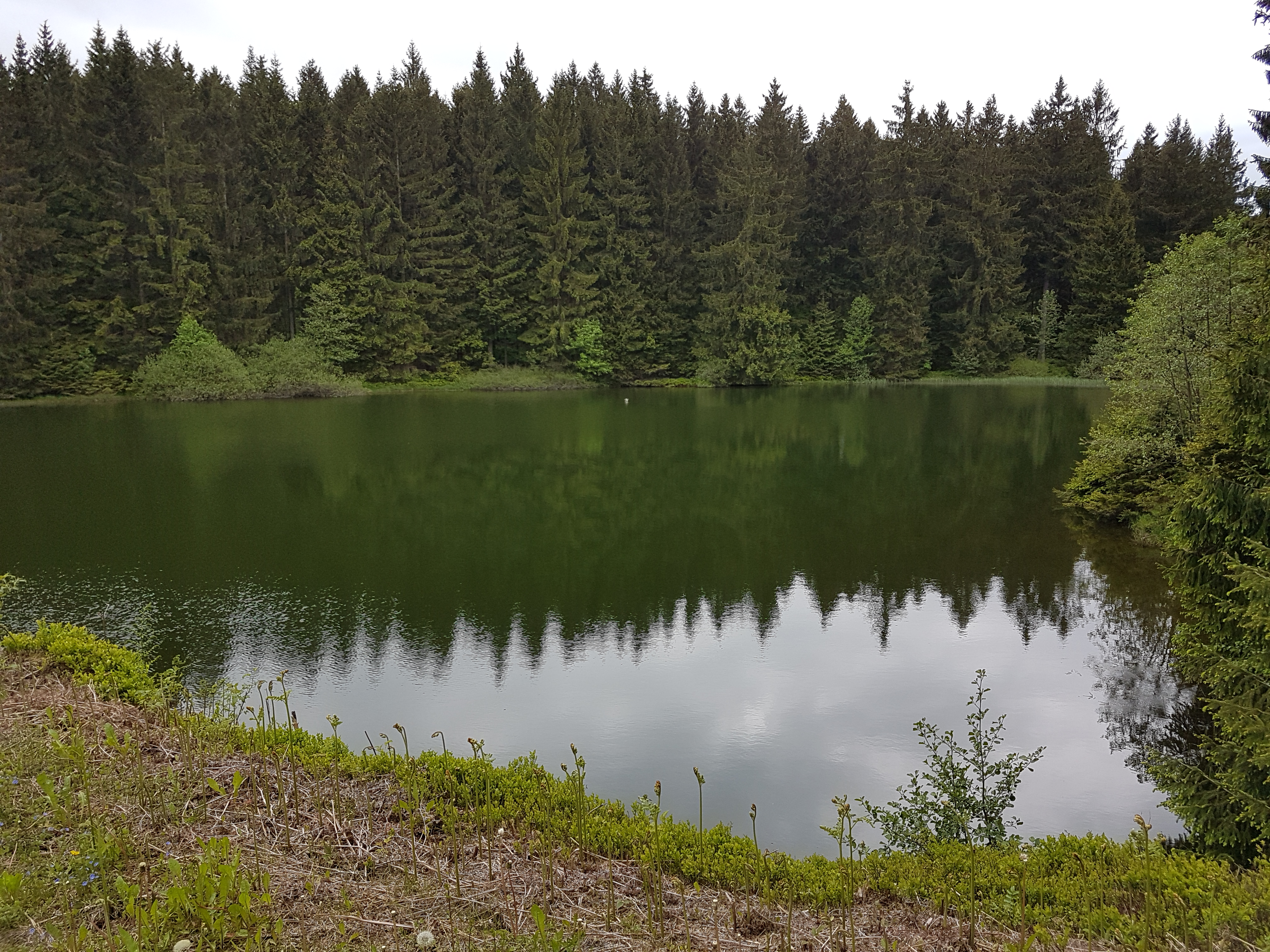 16.1-Mittlerer Einersberger Teich, 26-05-2019